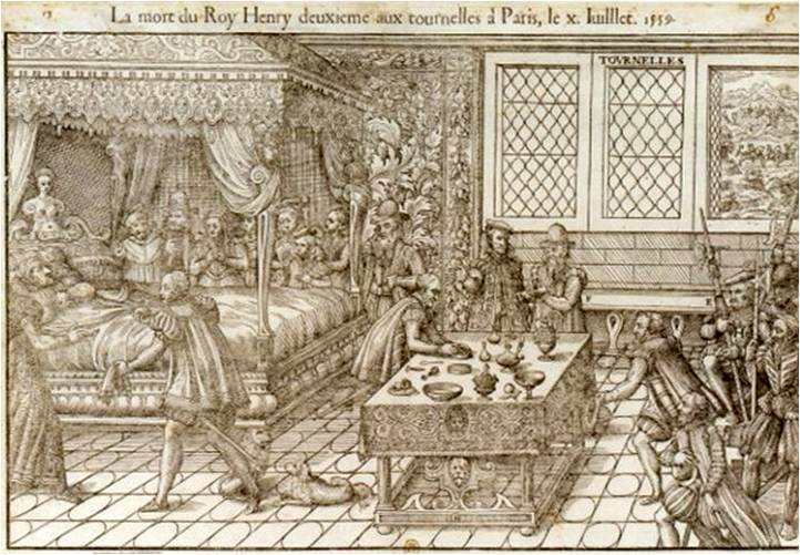 Llit